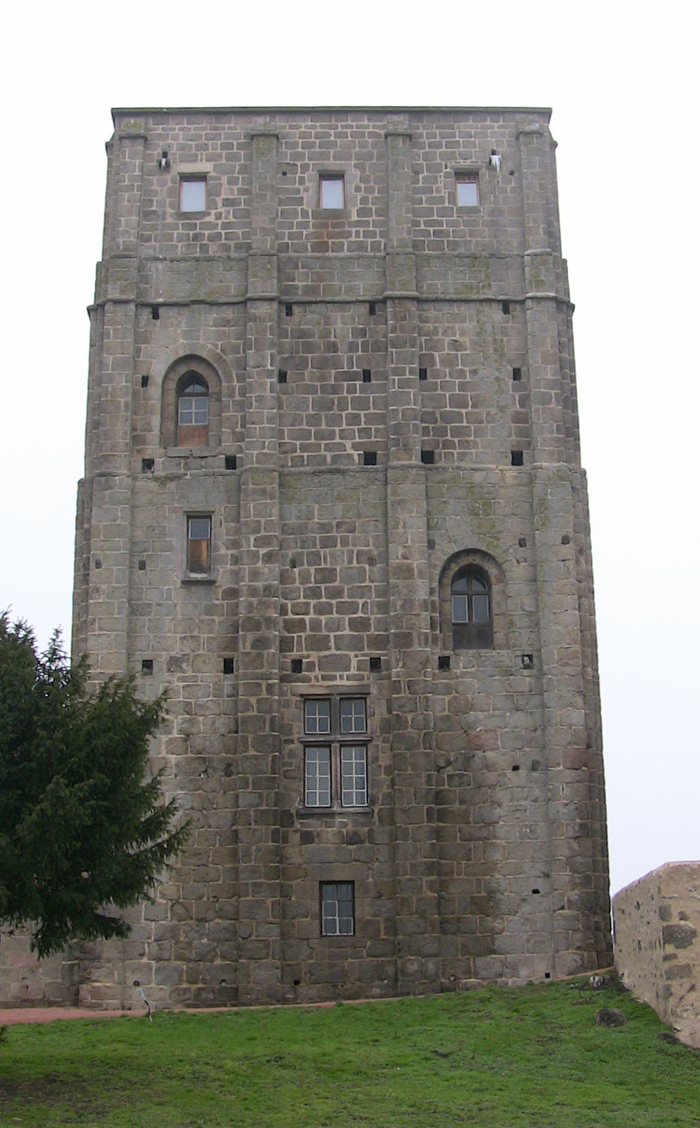 donjon roman d'Huriel.